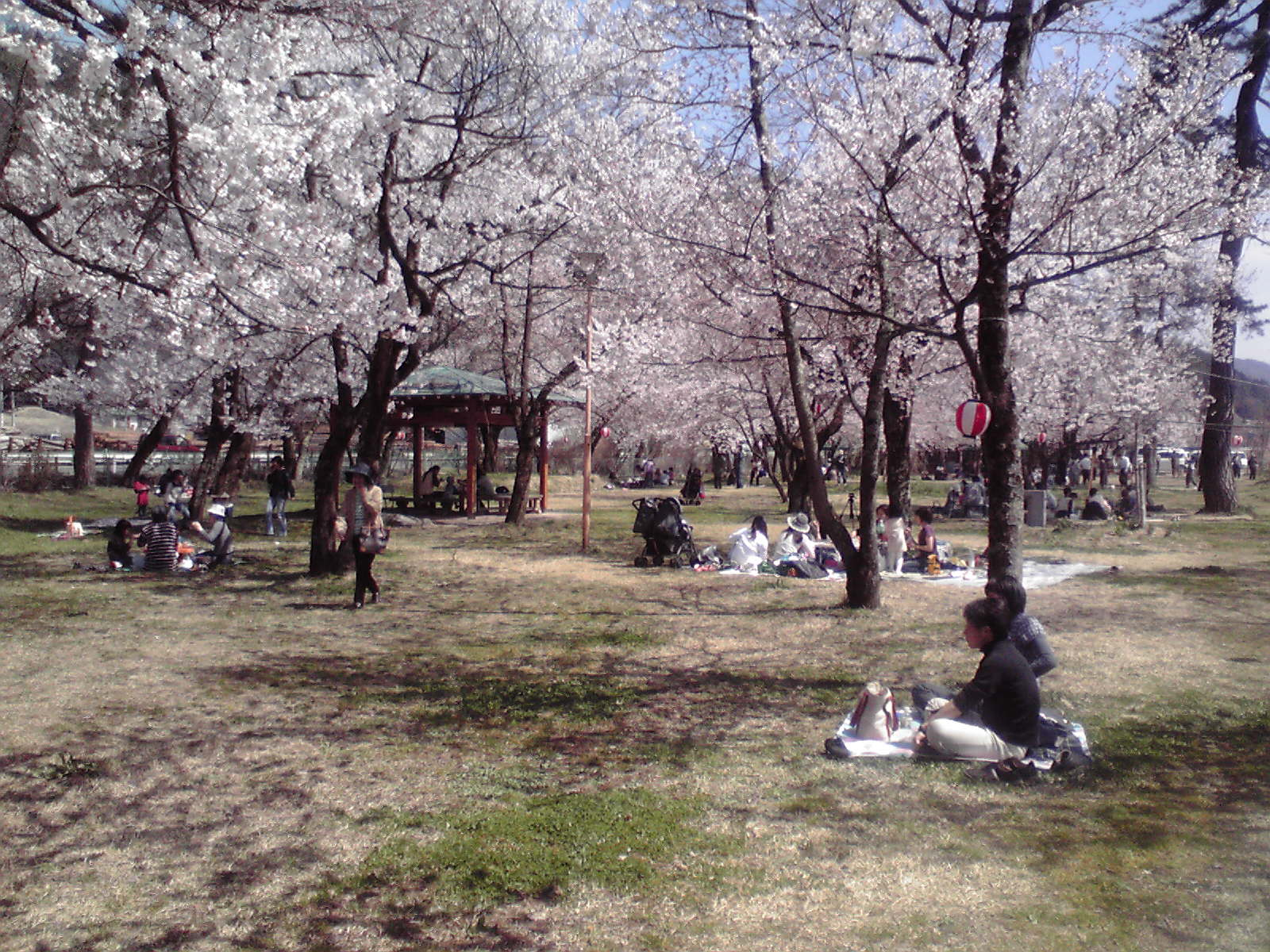 桜野公園 岐阜県高山市国府町